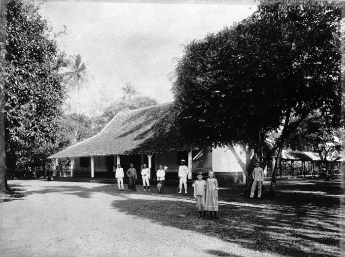 Foto. Een groepsportret voor de gouvernements pasanggrahan te Adjibarang.